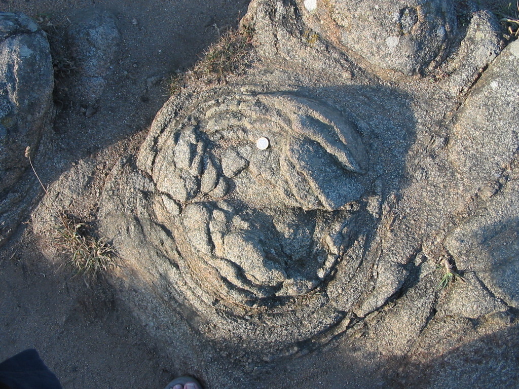 Alteración esferoidal concéntrica de granitos. Estaca de Bares (La Coruña, Galicia, España). Véase: Asensio Amor, I. (1985) Formas de alteración en materiales antiguos. Cadernos do Laboratorio Xeolóxico de Laxe, 9: 495-504 ISBN: 84-7492-367-4. (Moneda de escala: 1 EUR, Ø 23,25 mm)